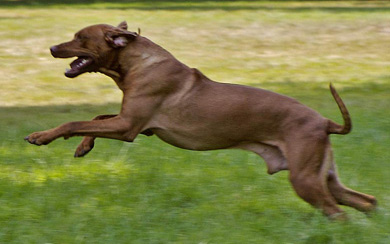 Rhodesian Ridgeback en course,puissance et dynamisme de l’arrière-main. vidocq M'tanami of Wolwekraal livernose.